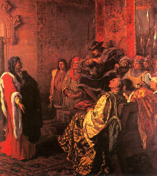 El conseller segon de Barcelona Joan Fiveller exigeix al rei Ferran d'Antequera que pagui els drets del vectigal de la carn (1416)